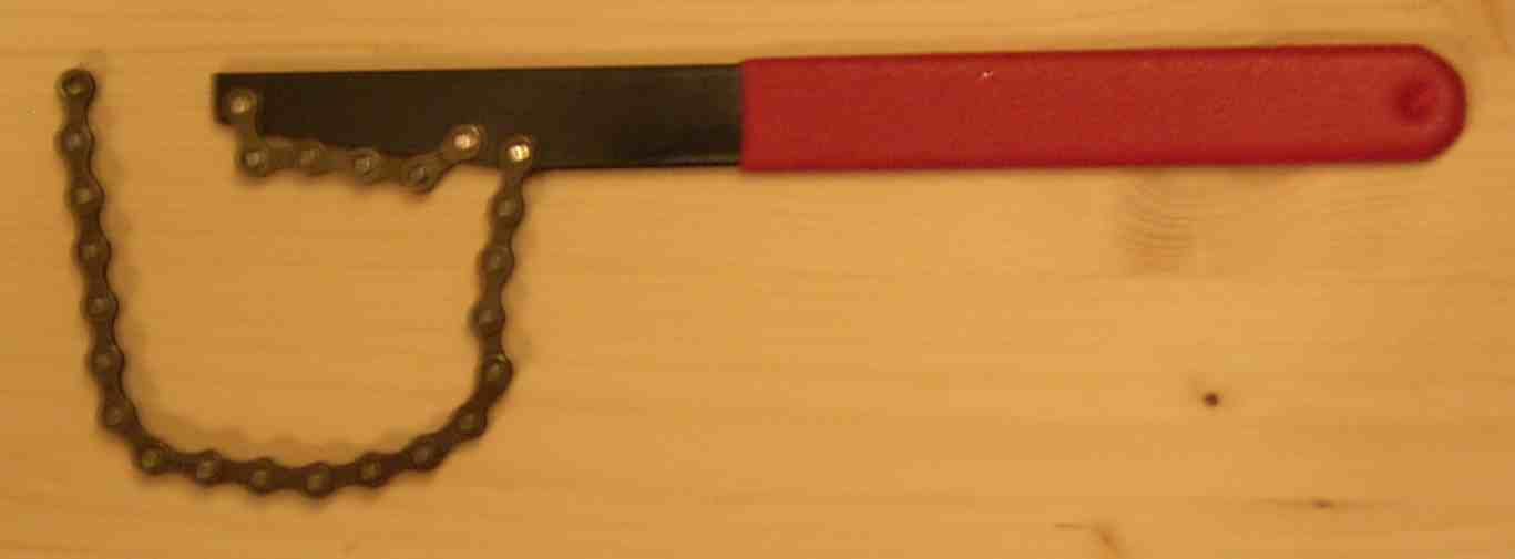 Kettenpeitsche zur (De-)Montage von Zahnkränzen.